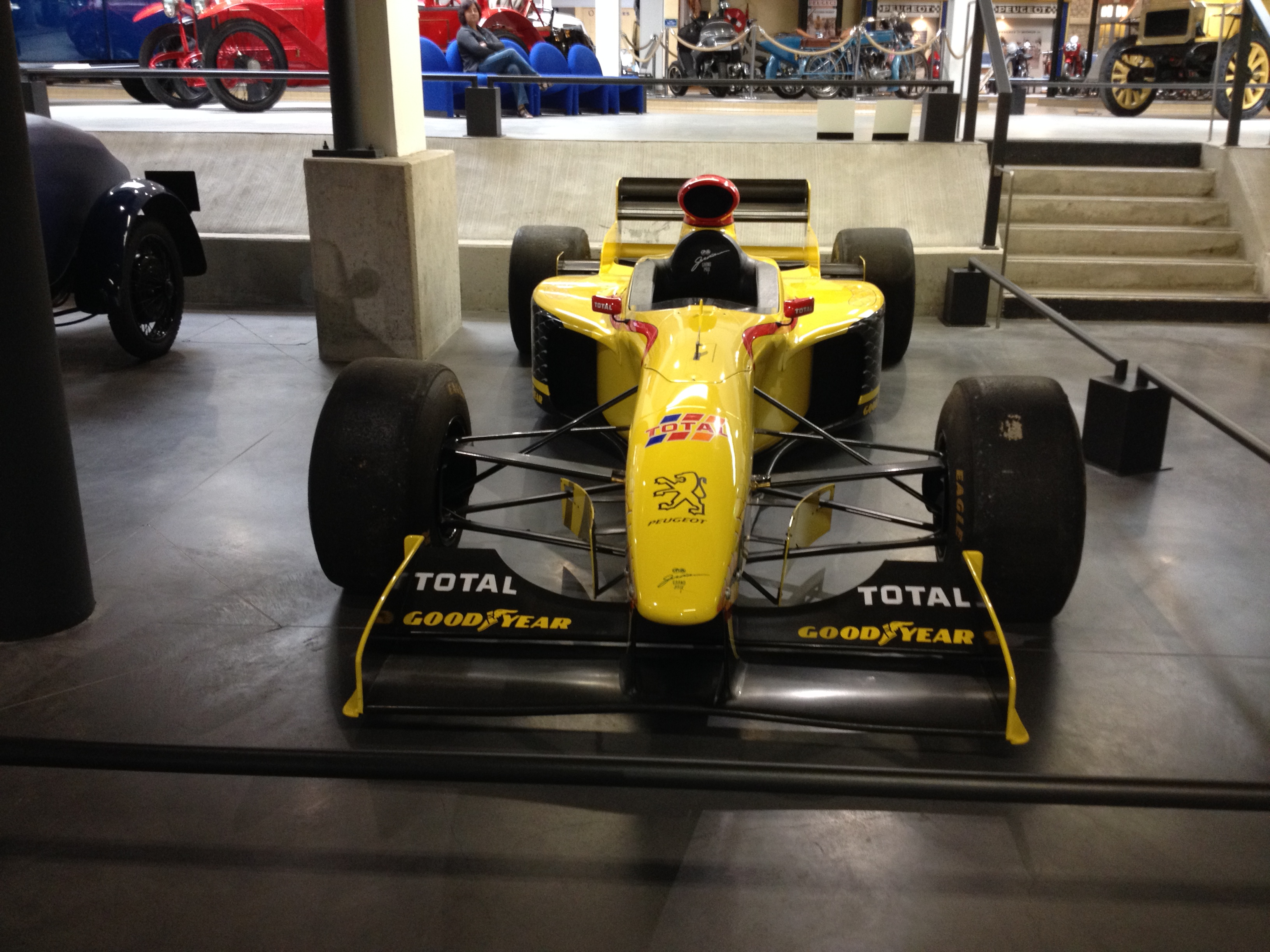 La Jordan 197 Peugeot, exposée au Musée Peugeot, à Sochaux.